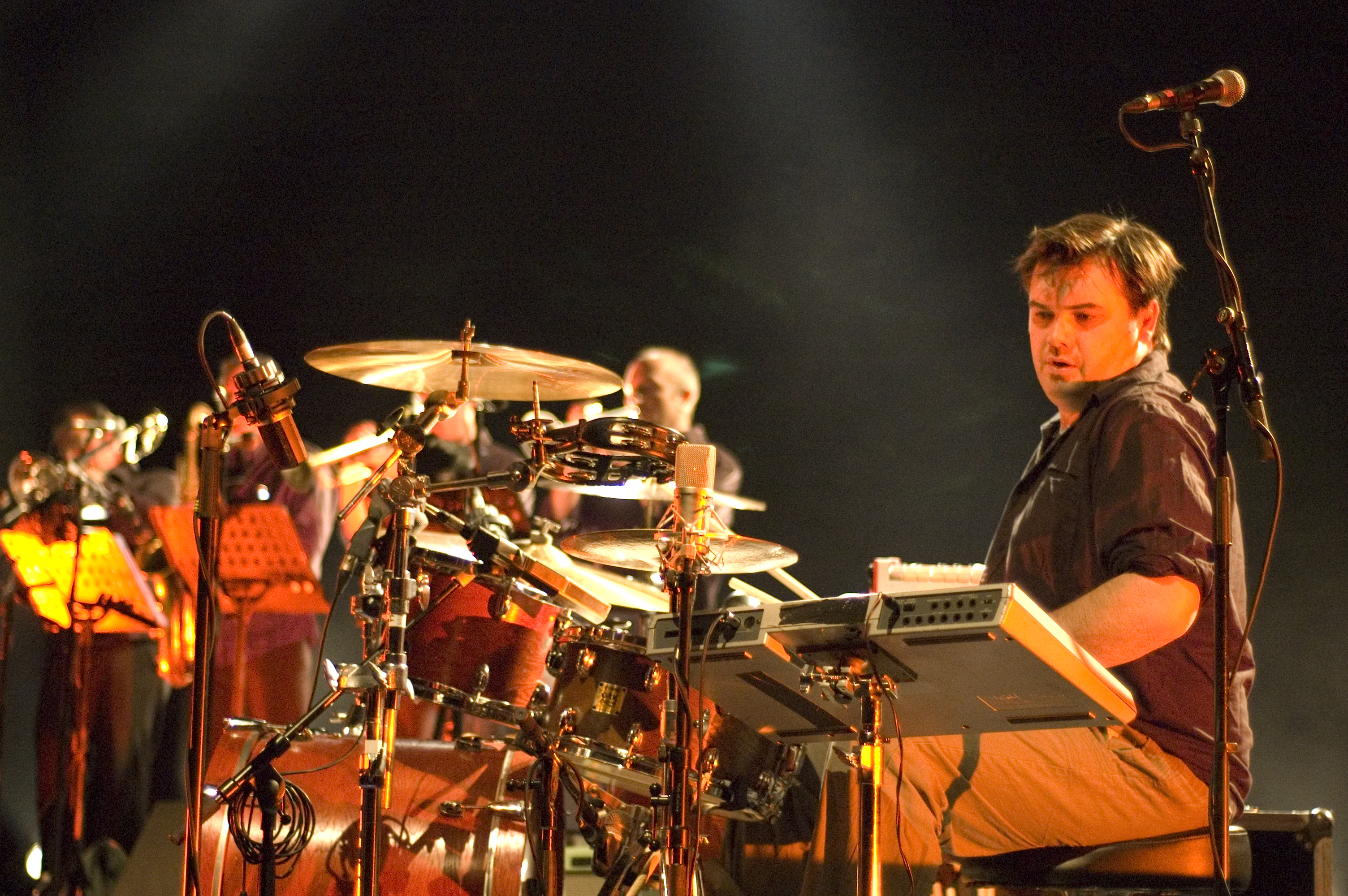 Pont-l'Abbé 2010